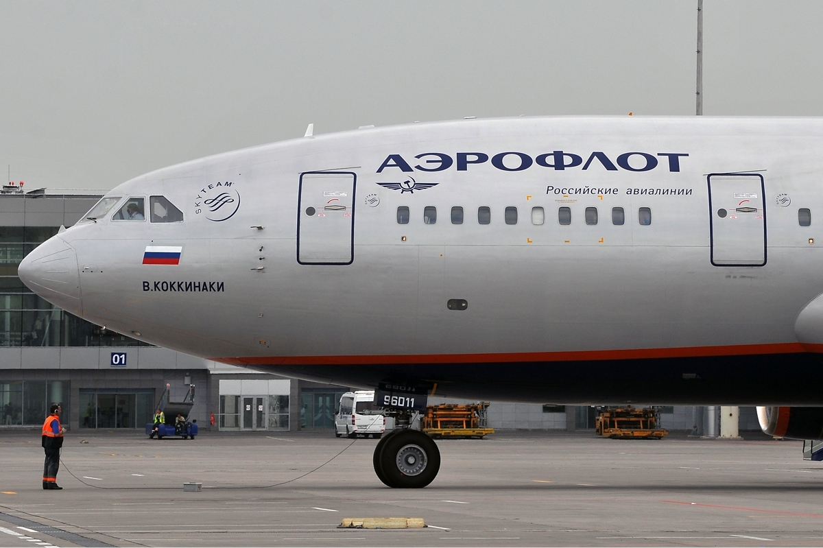 Aeroflot Ilyushin Il-96-300 "Vladimir Kokkinaki"